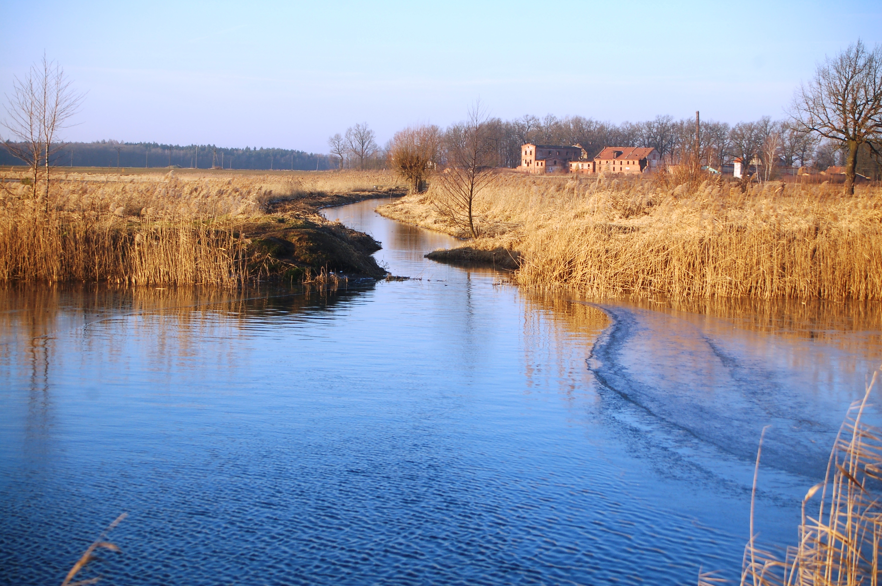 Potok Sucha wpływający do zalewu w Gościeszowicach